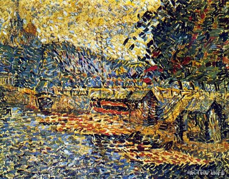 В. В. Суков (1865-1942). Лодки у Летнего сада. 1930. Холст, масло. 107 х 133 см